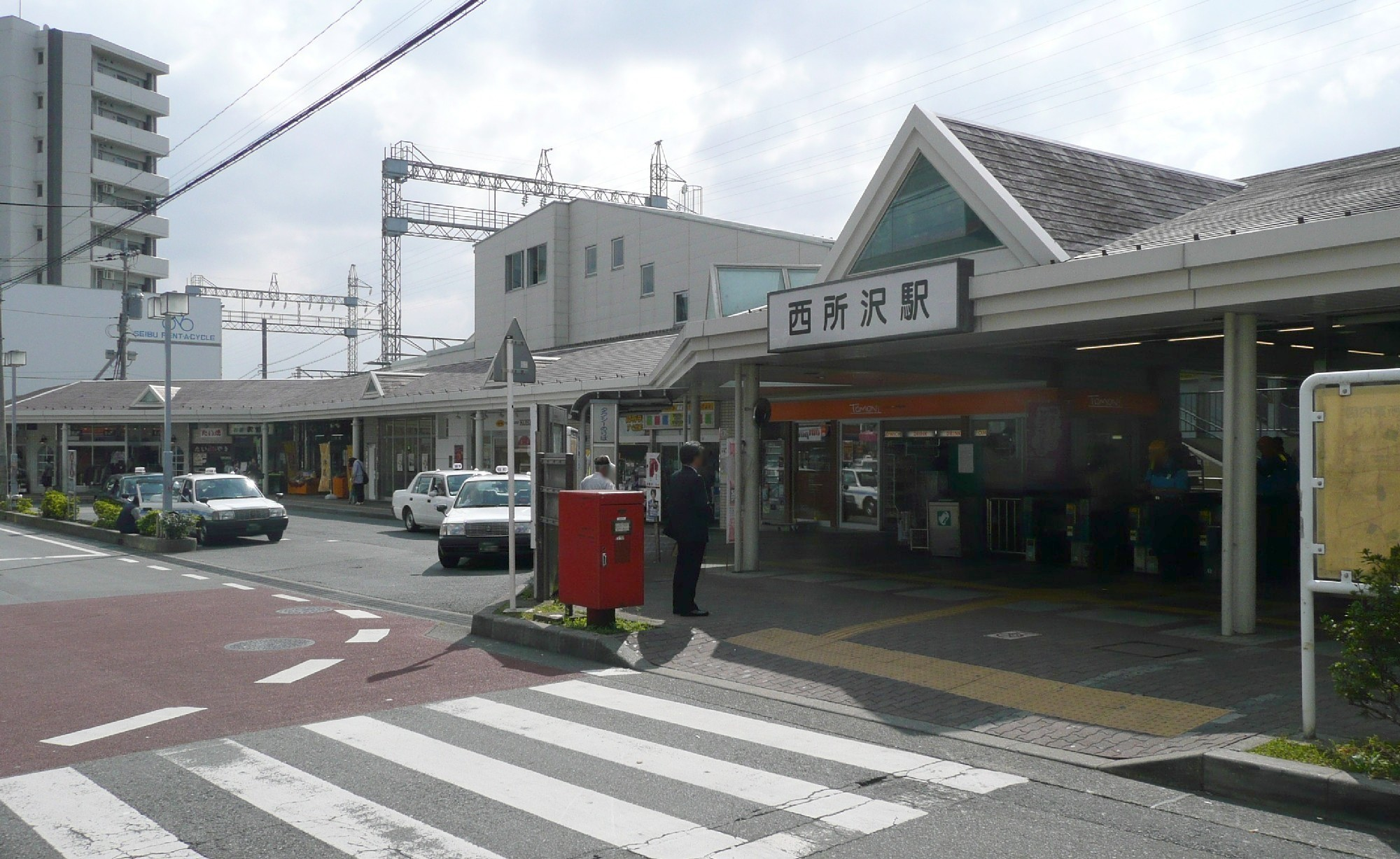 西所沢駅 北側（改札口は駅北側のみ）